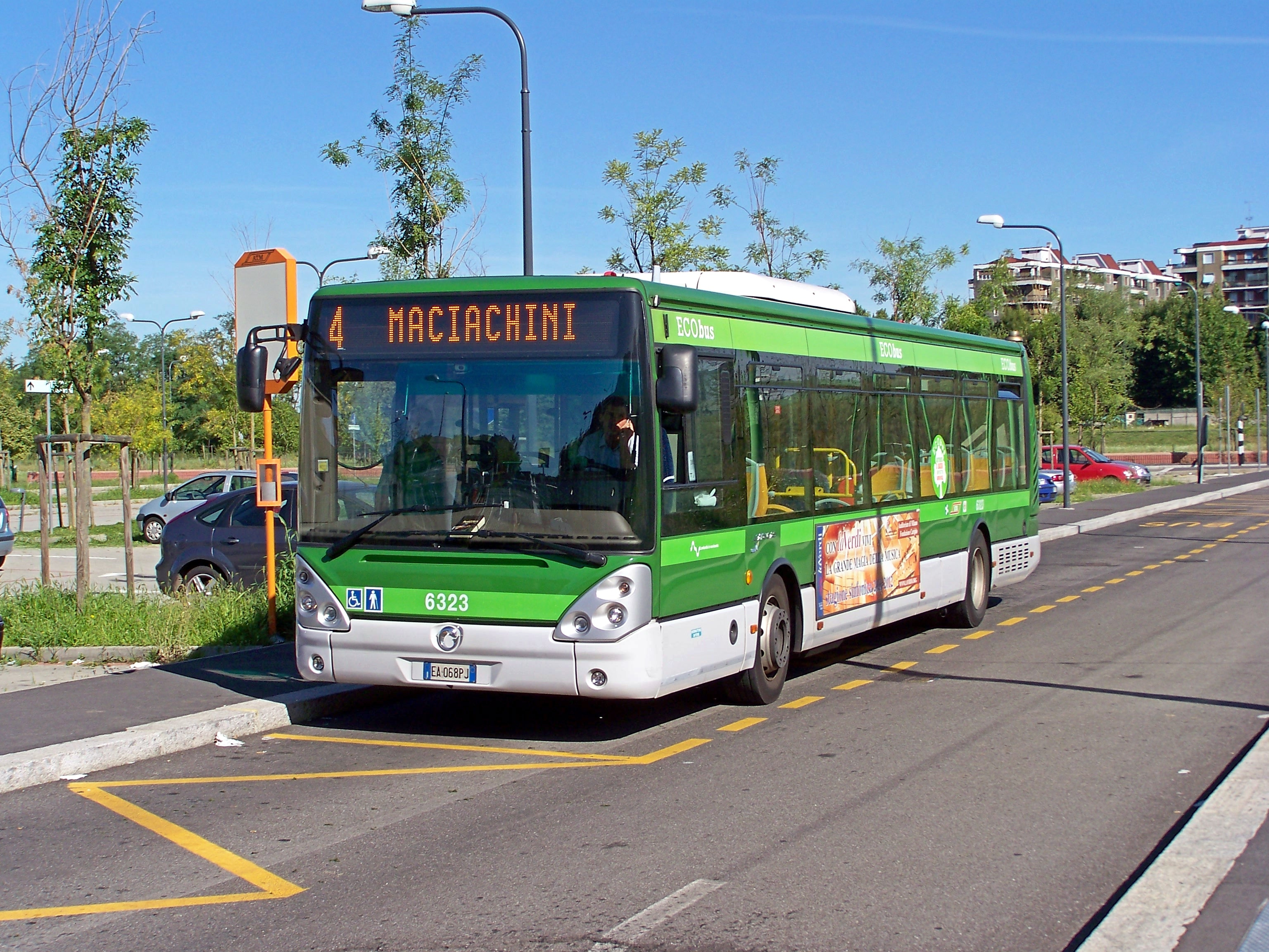 Il Citelis 6223 in livrea "Ecobus" utilizzato per il servizio sostitutivo della linea tranviaria 4, in sosta presso Parco Nord.Il 10 agosto il servizio sulla linea tranviaria 4 è stato soppresso tra l'Ospedale Maggiore e Parco Nord e sostituito da un servizio autobus tra Maciachini e Parco Nord.